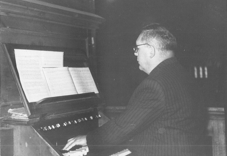 Kazimieras Žalalis